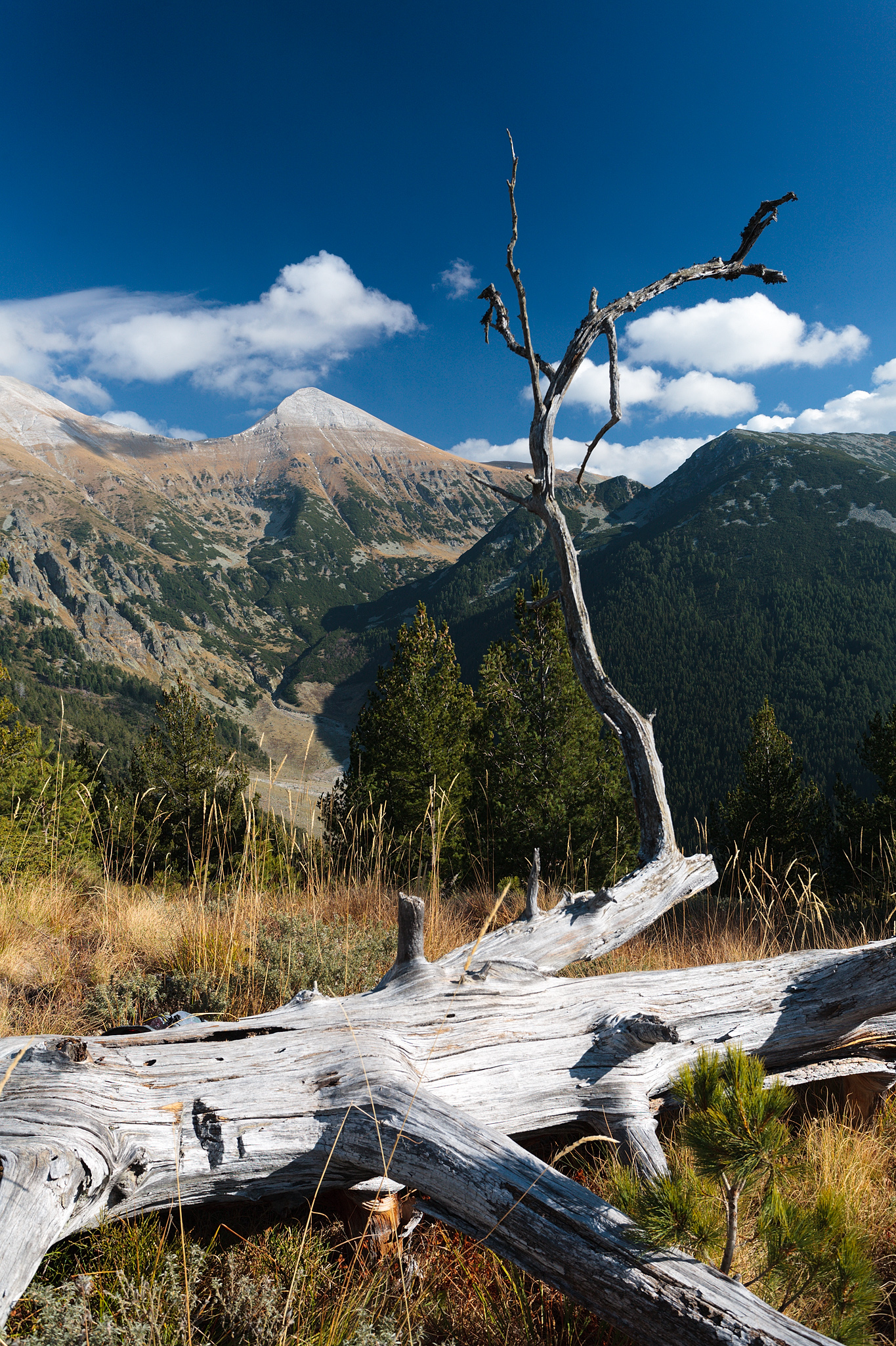 Пирин, връх Вихрен в Пирин планина